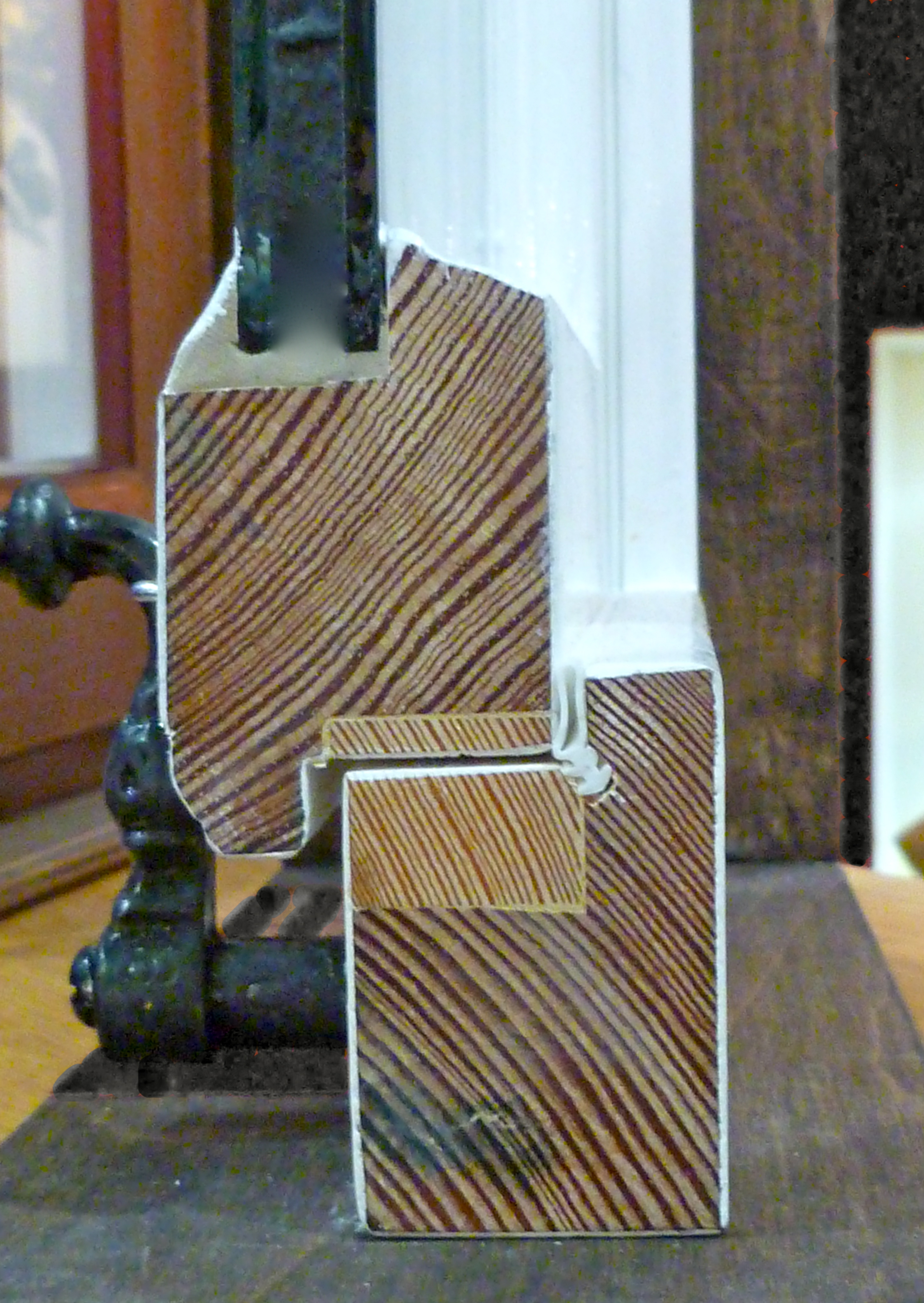 Fenstersanierung: Austausch historischer Scheiben mit Isolierglasscheiben.